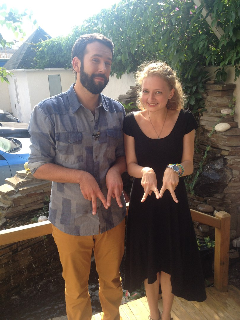 Вадим Абрамов (Ревизор)